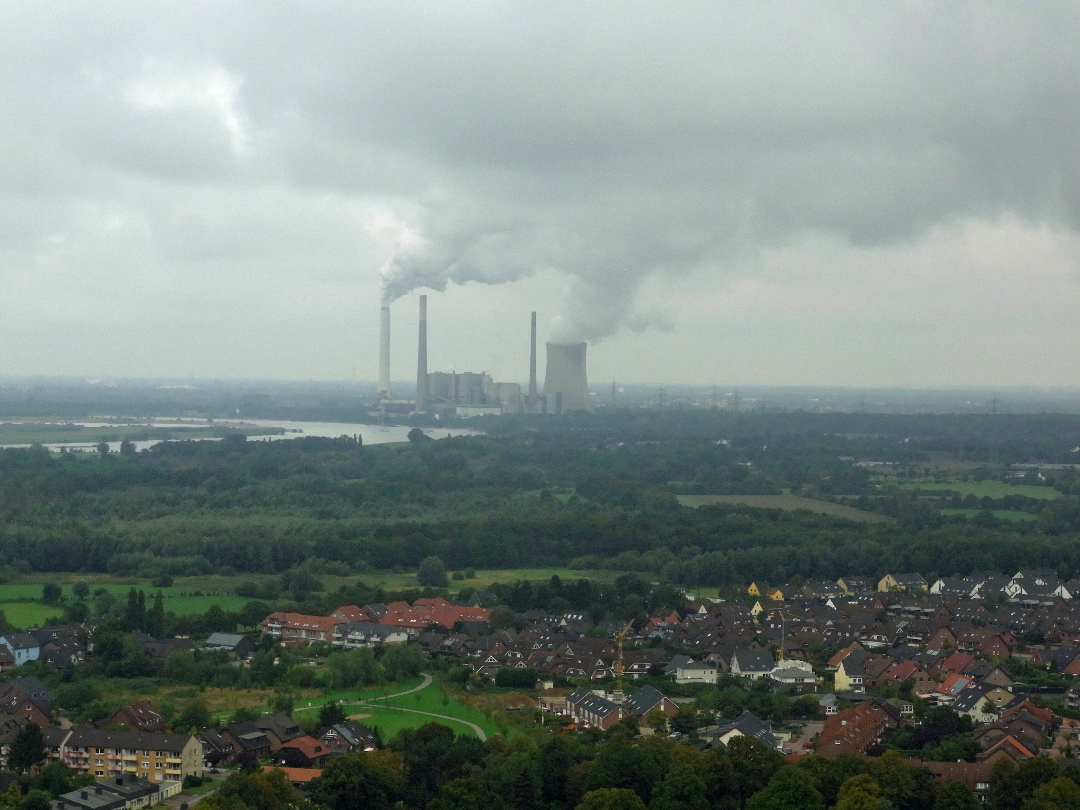 Blick vom Block 9 des Kraftwerks Duisburg-Walsum: Walsum, Rheinaue Walsum und Kraftwerk Voerde